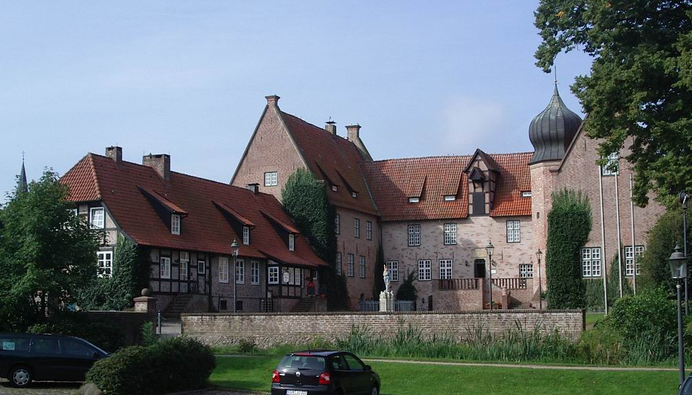 Bederkesa, Burg, Hof mit Roland-Statue Foto von Benutzer:Geoz 2005